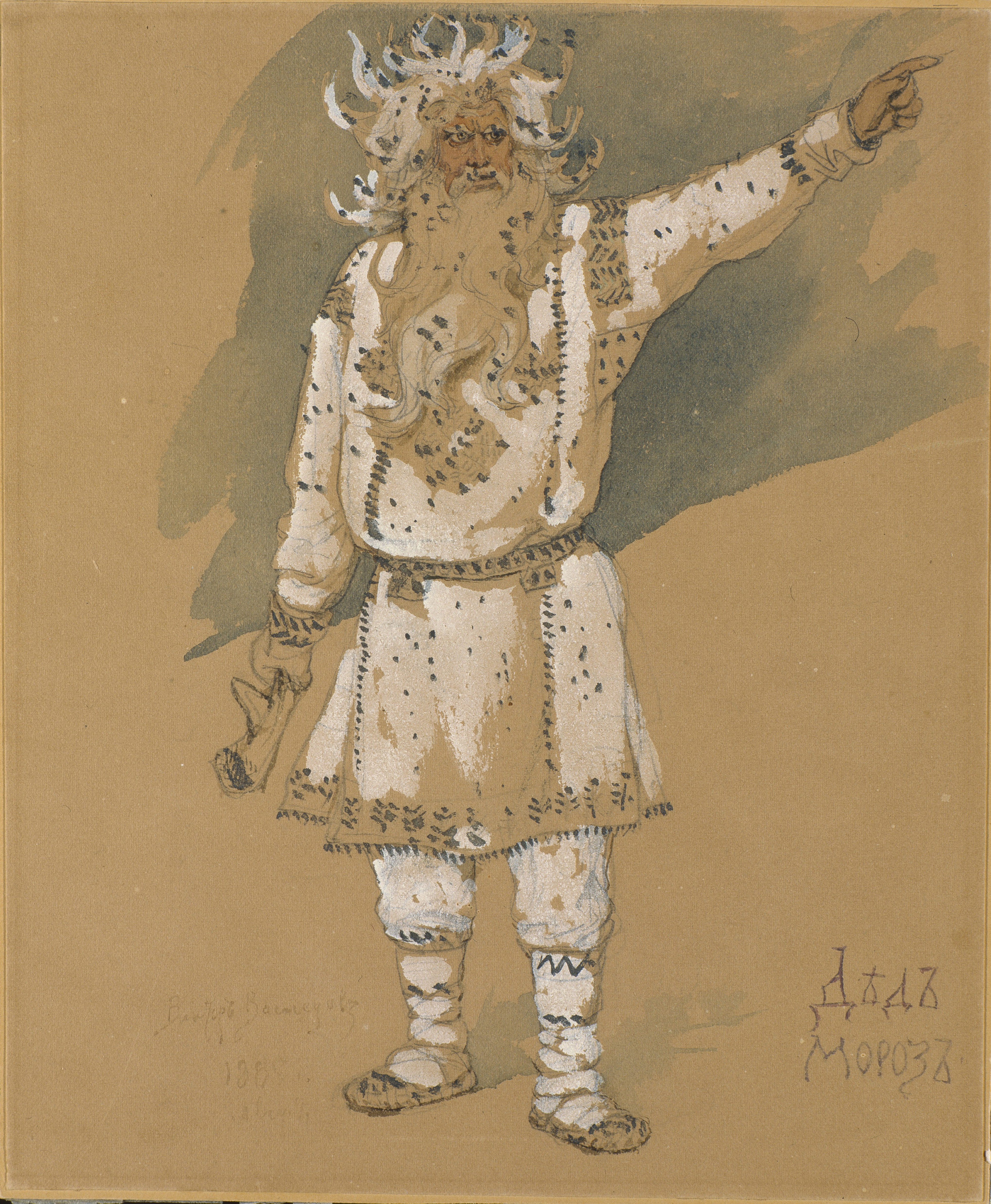 Дед Мороз